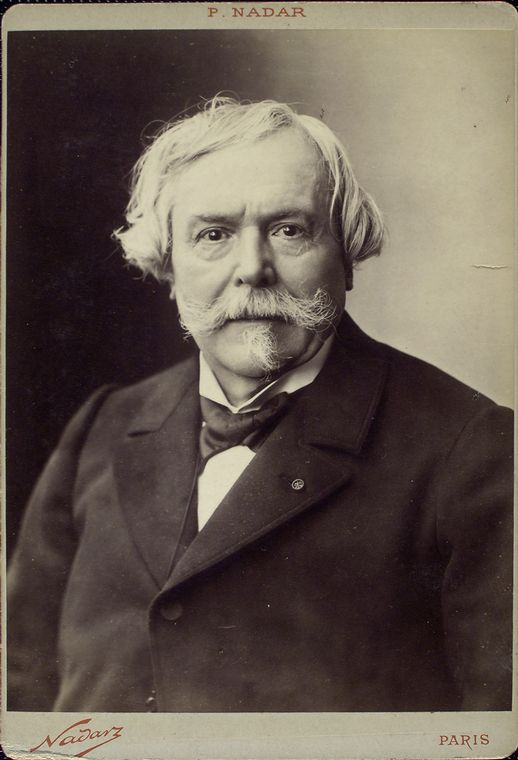 Der französische Schriftsteller und Buchpreisstifter Edmond de Goncourt (1822-1896)